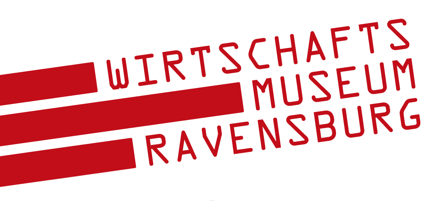 Logo des Wirtschaftsmuseums Ravensburg